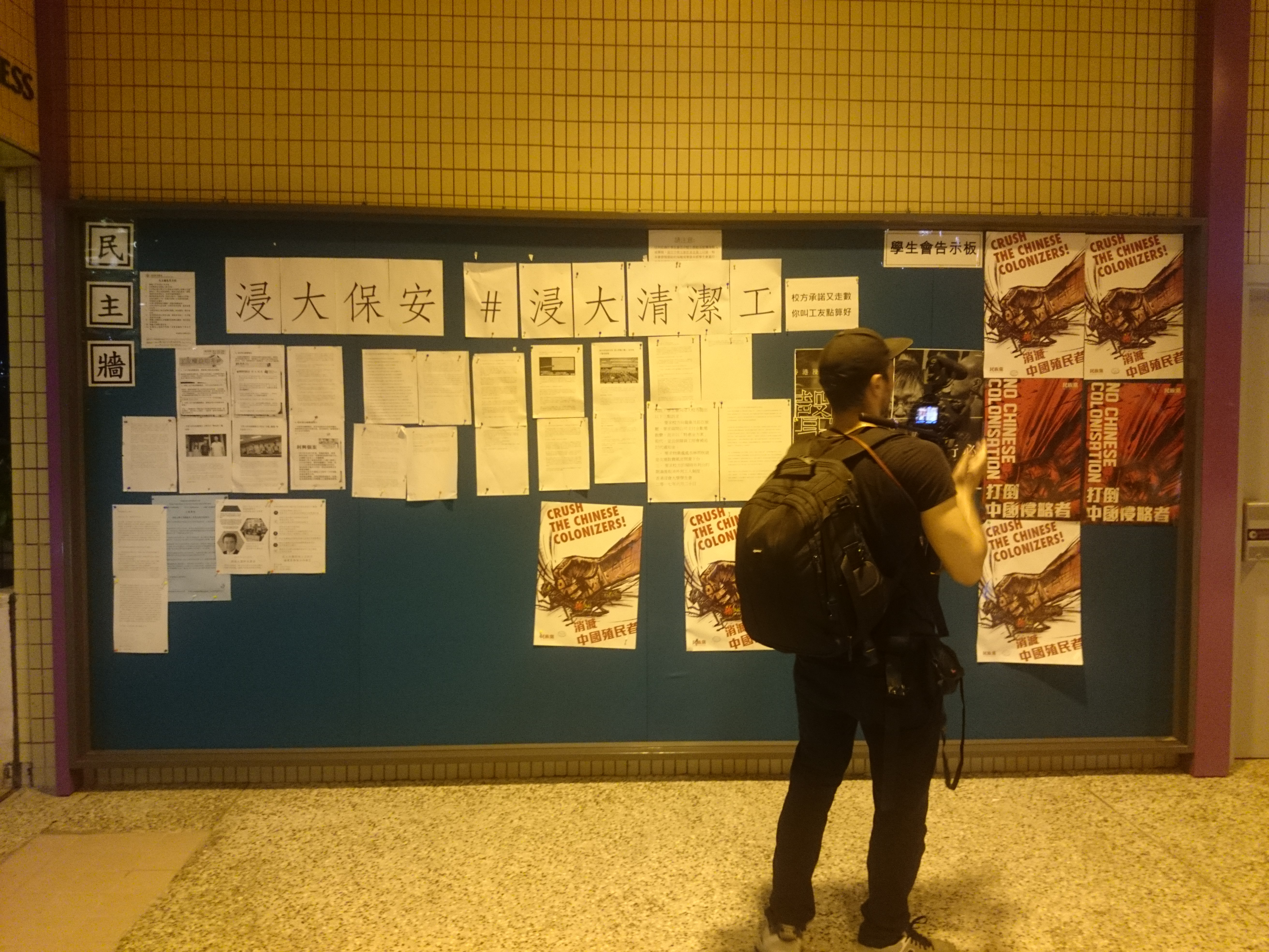 粵語: 呢個係開埠177年6月30號嘅香港浸會大學民主牆，個民主牆放咗香港民族黨同埋鬧校方嘅嘢。